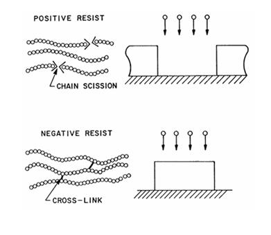 شکل 4- شماتیکی از ماده مقاوم پلیمری مثبت (شکل بالایی) و منفی (شکل پایینی).